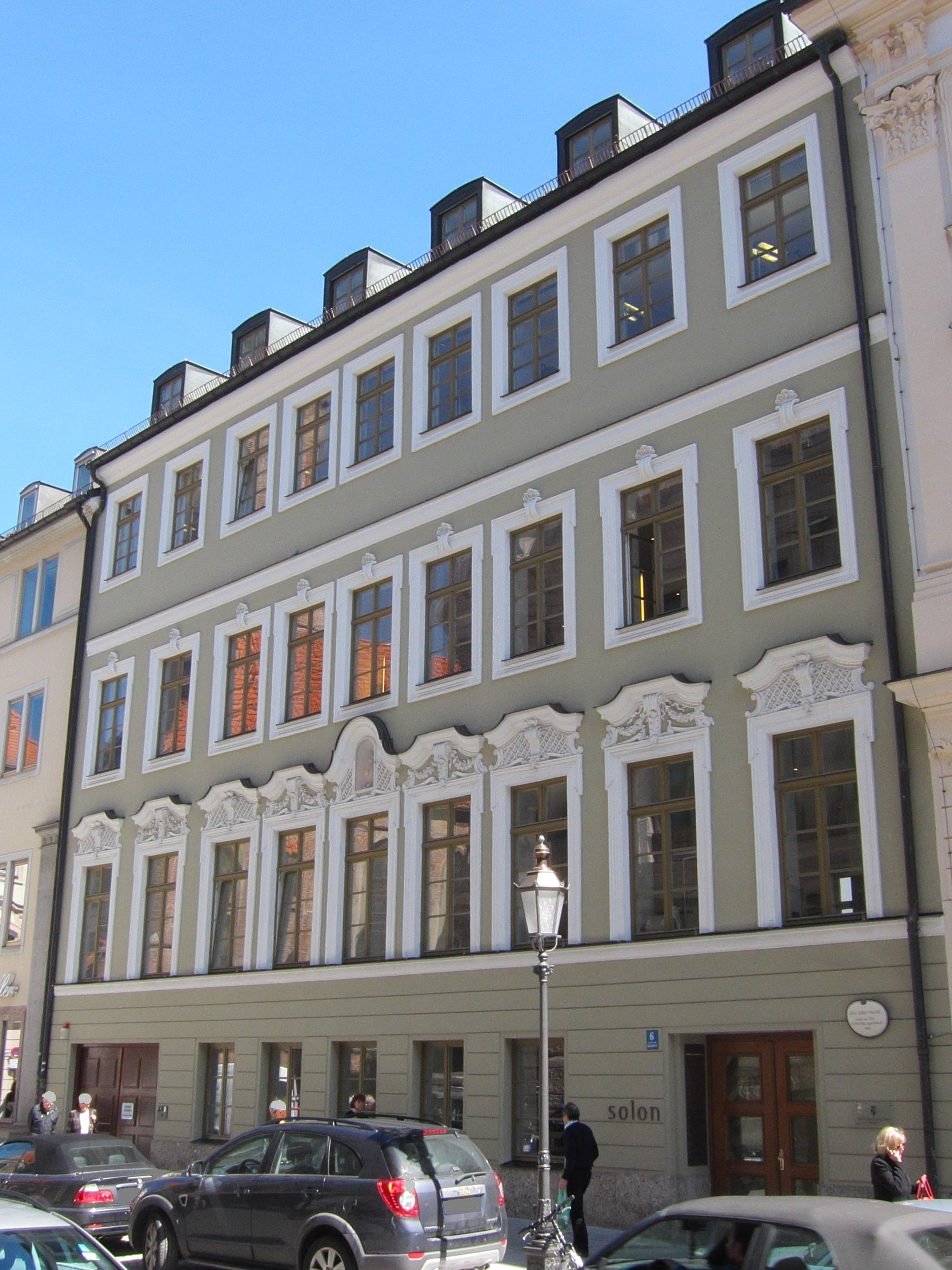 Kardinal-Faulhaber-Straße 6; ehem. Graf-Spreti-Palais, jetzt Bankgebäude, spätbarock, wohl um 1730, mit reicher Stuckgliederung im ersten Stock, sonst stark verändert.